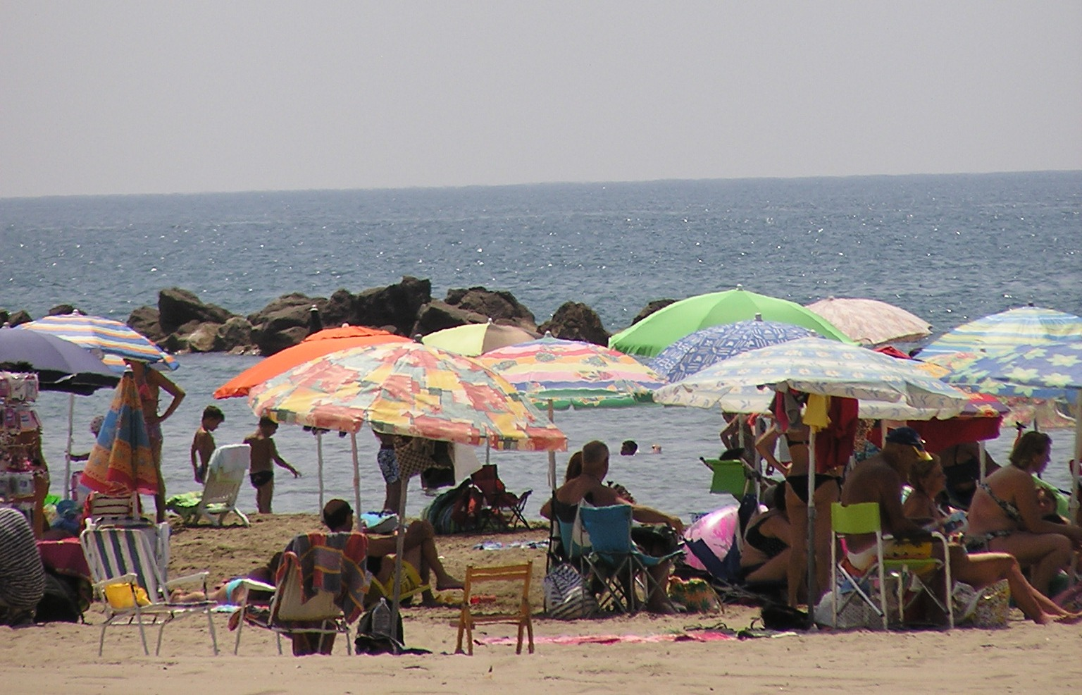 Spiaggia di Casal Velino Marina.